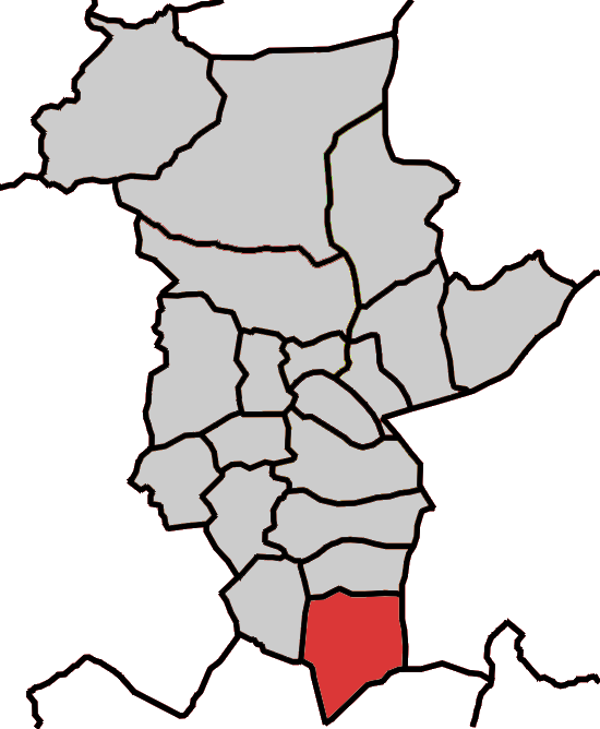 Situación da parroquia de A Graña de Vilarente no concello de Abadín